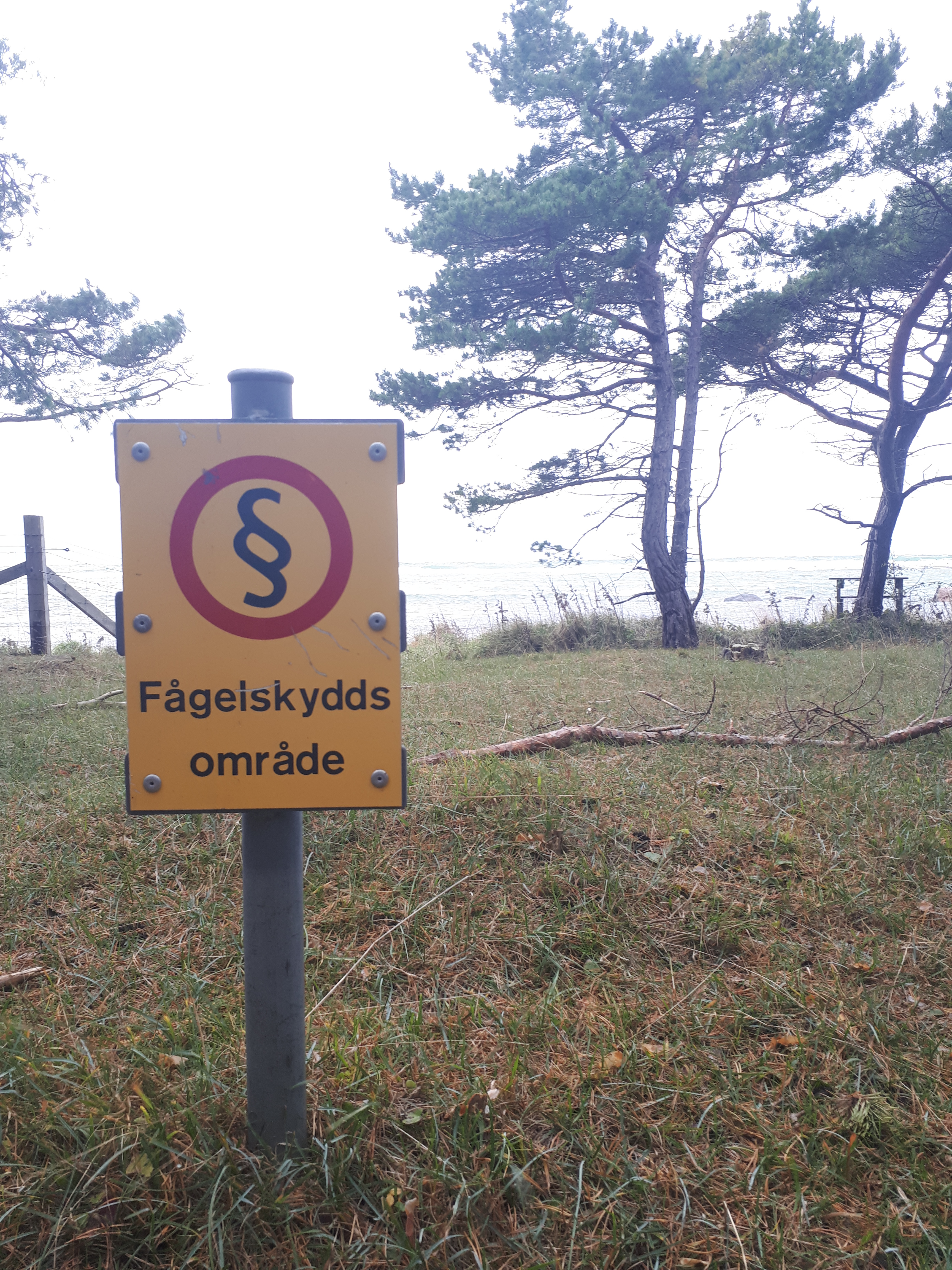 Fågelskyddsområdes skylt i Brucebo naturreservat.